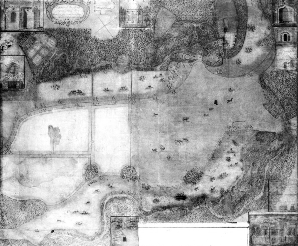 Plan zur Umgestaltung des Parks von Wormsley Park